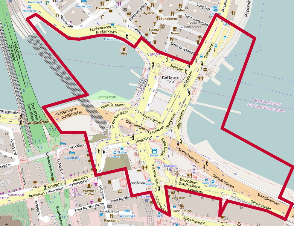 Planområde för "Nya Slussen", källa Stockholms stadsbyggnadskontor. Bakgrundskarta från "Open Street Map"